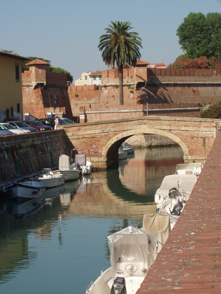 Livorno: La Fortezza Nuova ("The New Fortress")